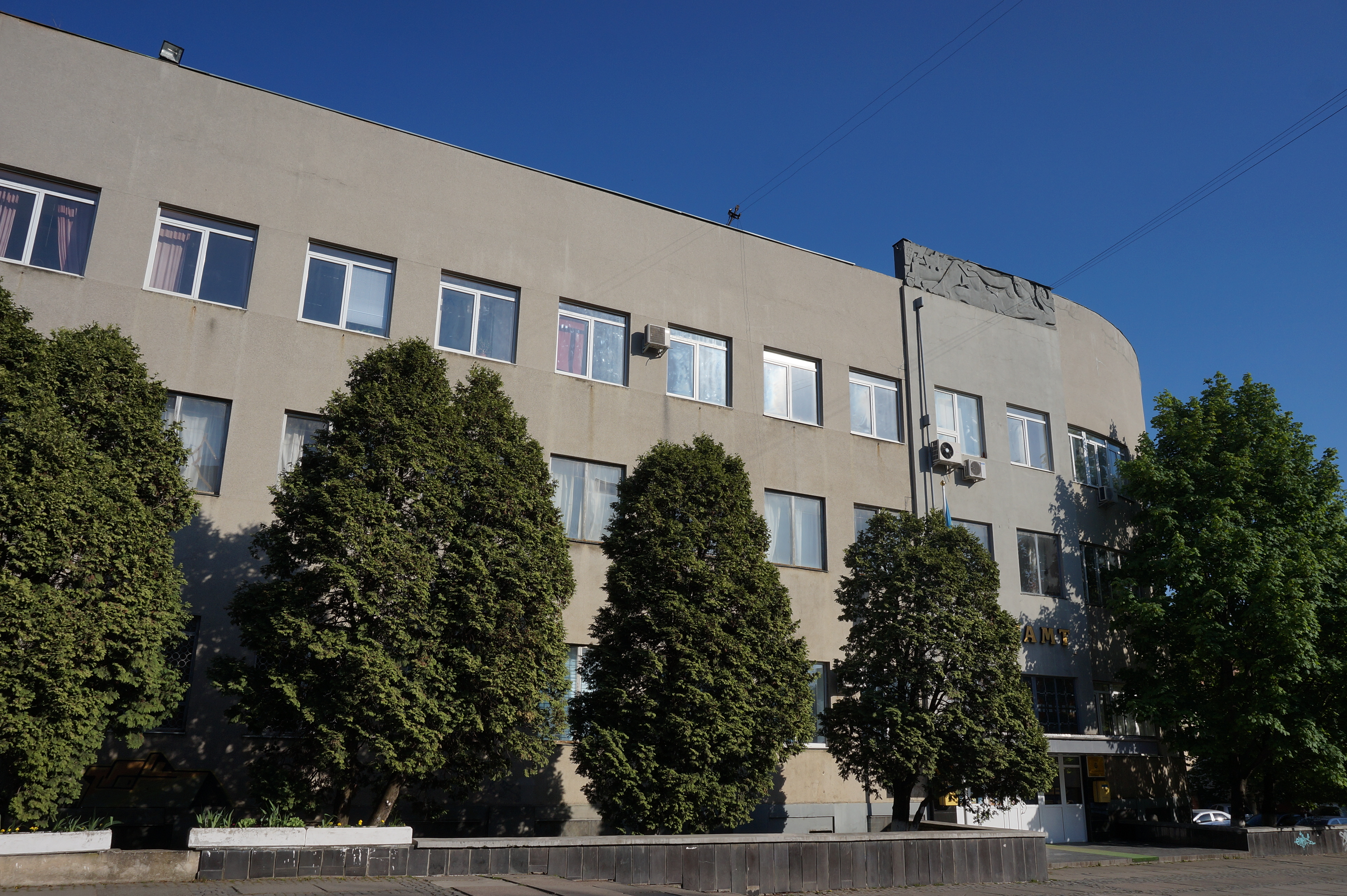 Будівля головної пошти, Ужгород, вул. Поштова, 4